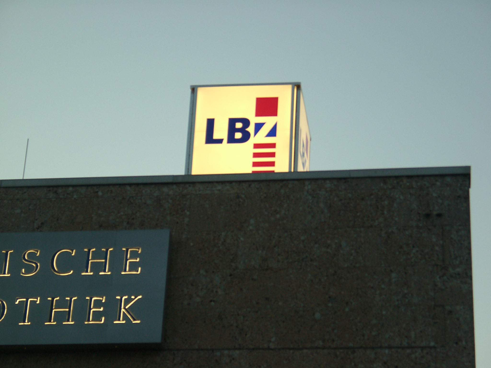 Logo des Landesbibliothekszentrums Rheinland-Pfalz auf der Rheinischen Landesbibliothek Koblenz Name of Creator: Klaus Graf